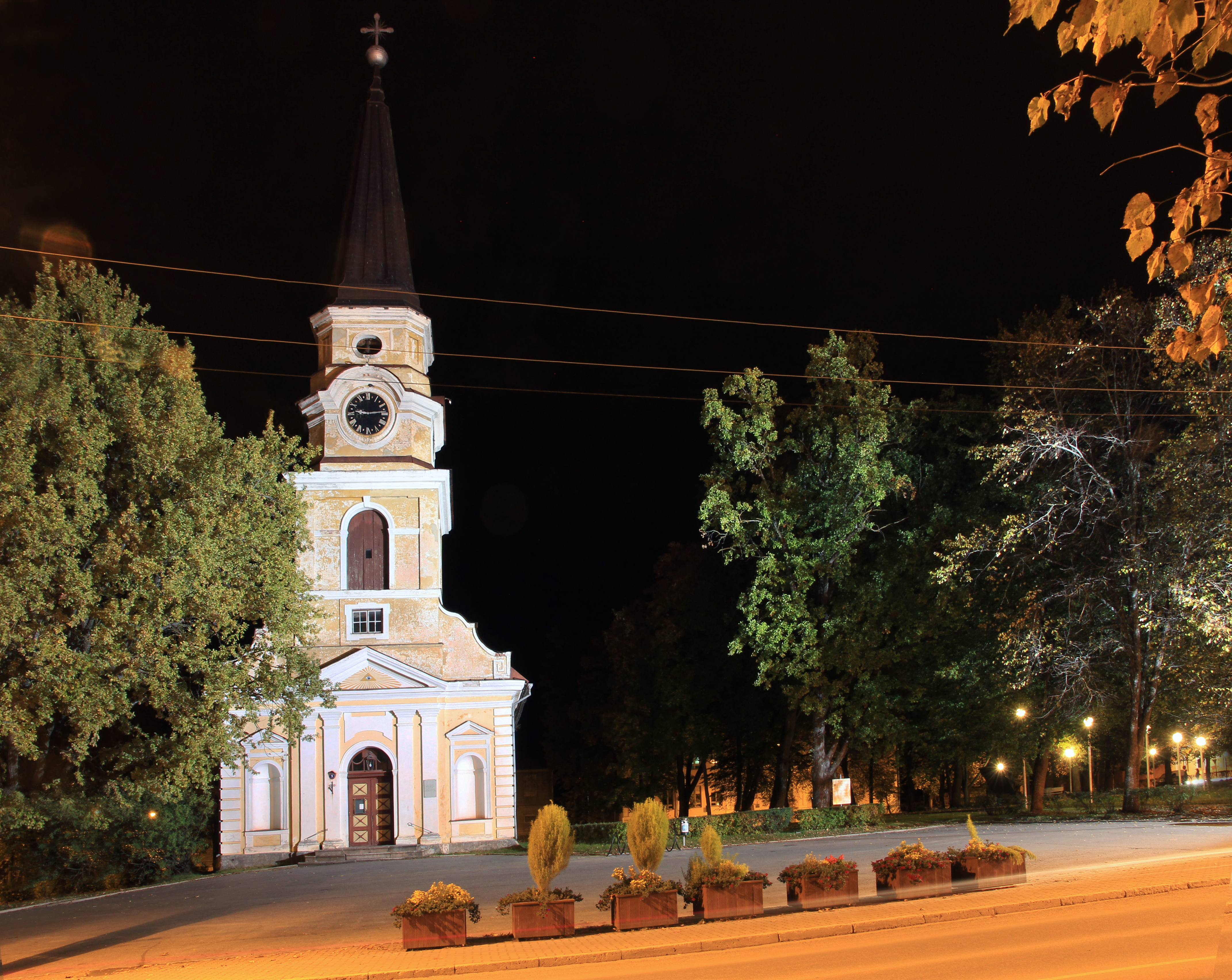 Võru Katariina kirik õhtul